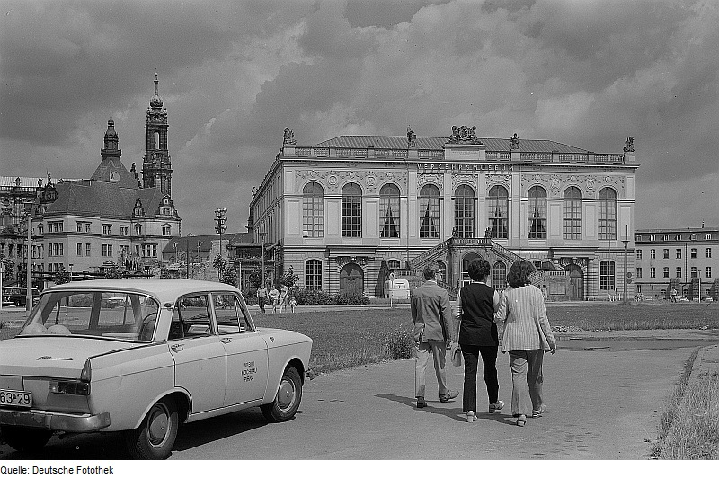 Original image description from the Deutsche FotothekDresden. Johanneum, Verkehrsmuseum